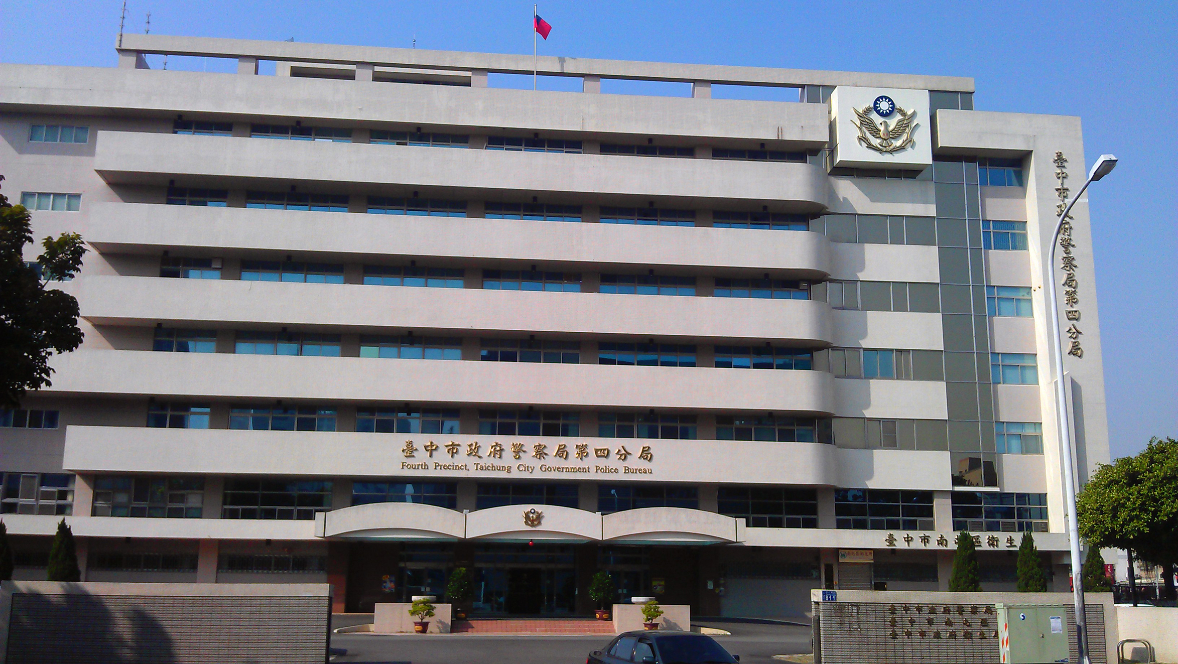 臺中市警察局第四分局、南屯區衛生所